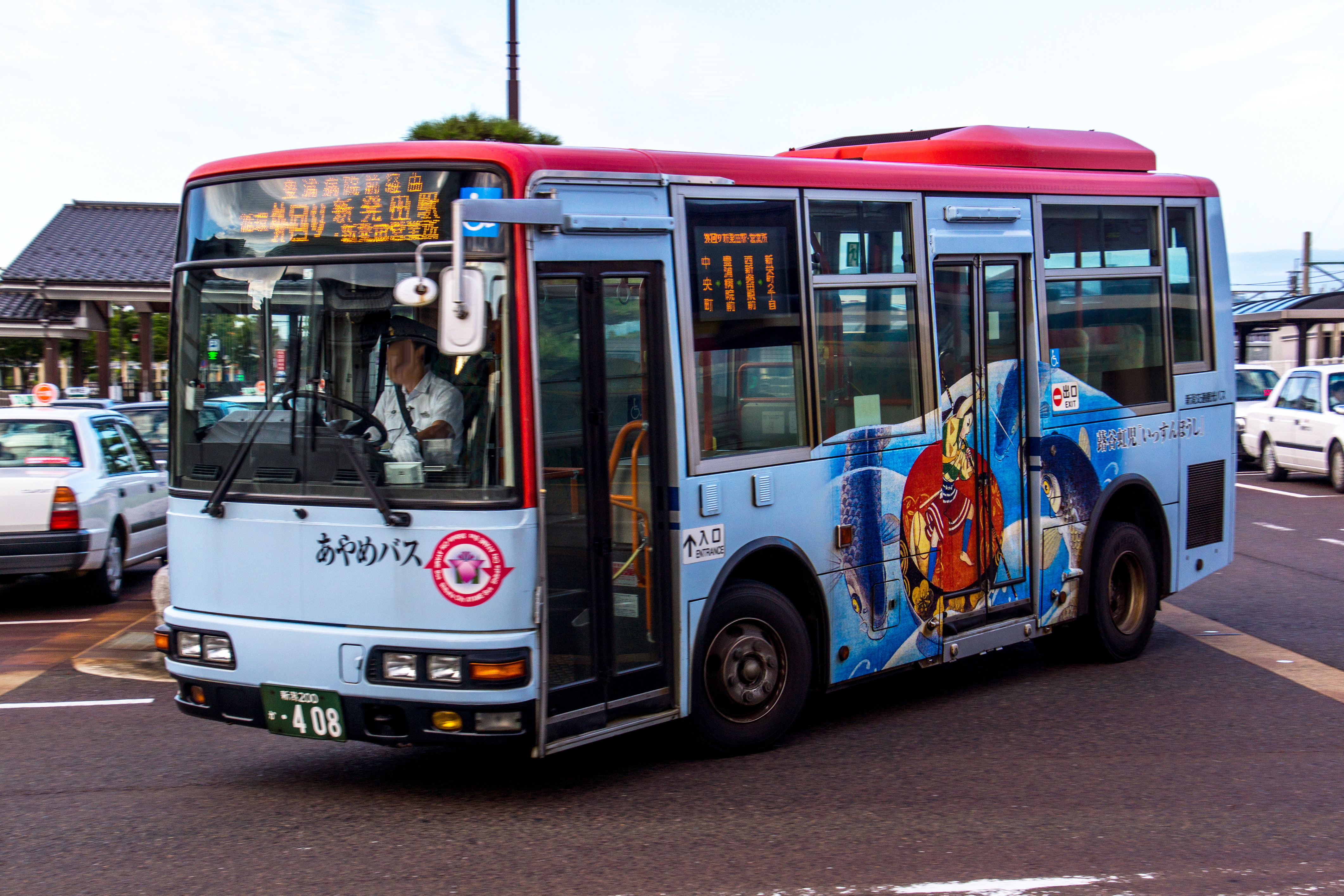 「あやめバス」車両（2017年9月、新発田駅）